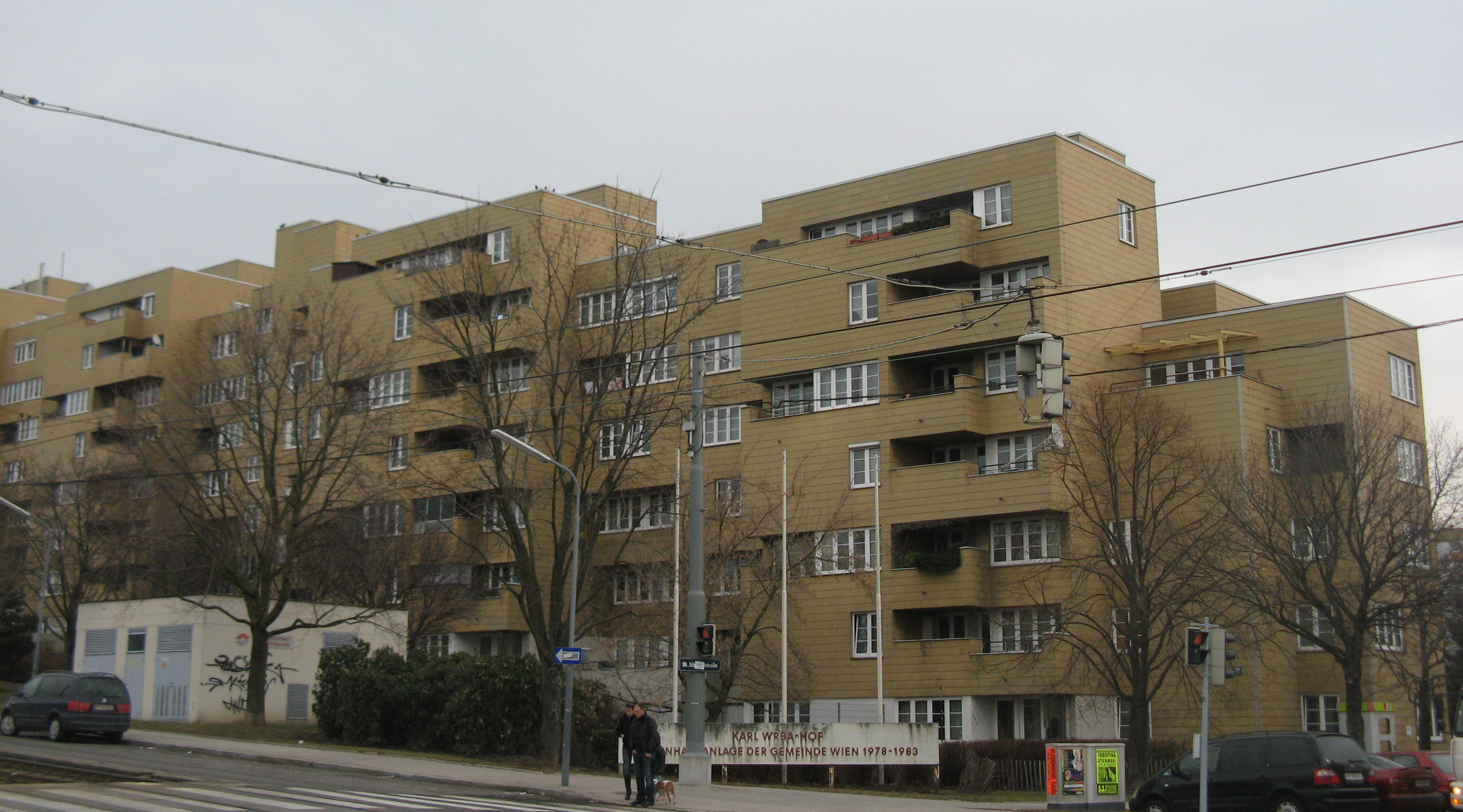 Karl-Wrba-Hof (1978-83) von Rupert Falkner, Neilreichgasse 111-115, Wien-Favoriten